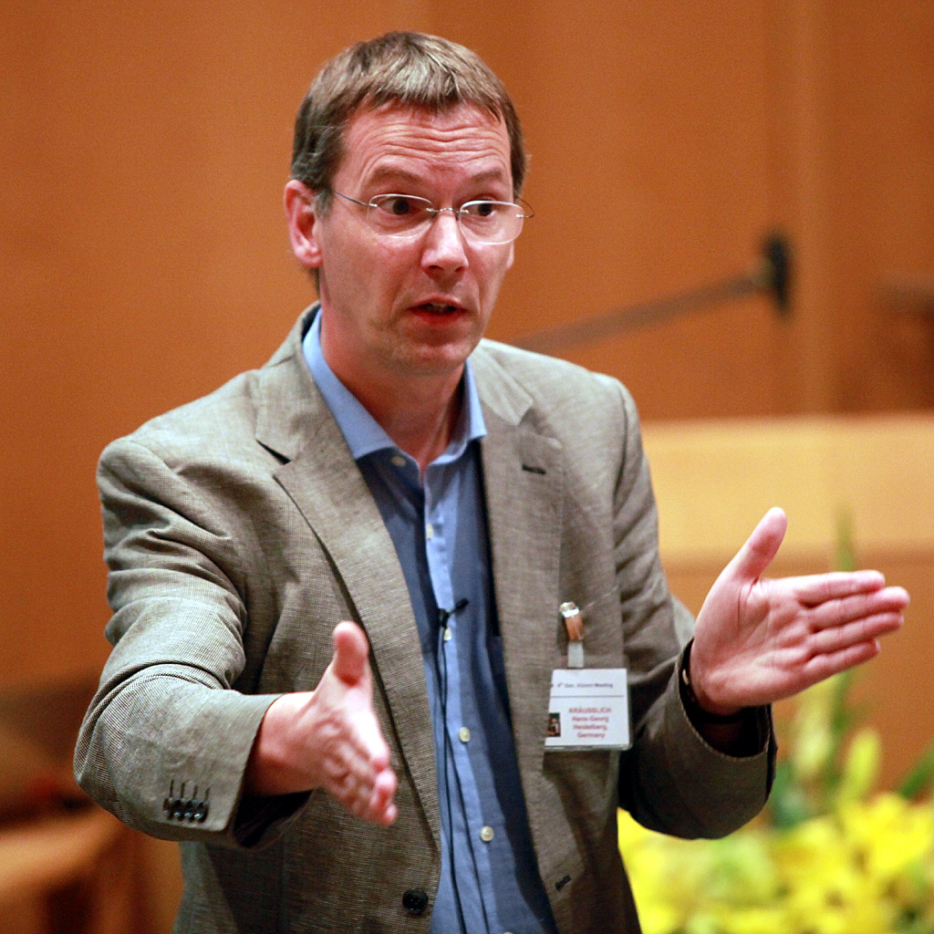 Hans-Georg Kräusslich, Professor an der Universität Heidelberg und Direktor des Hygiene Institutes der Universität Heidelberg.